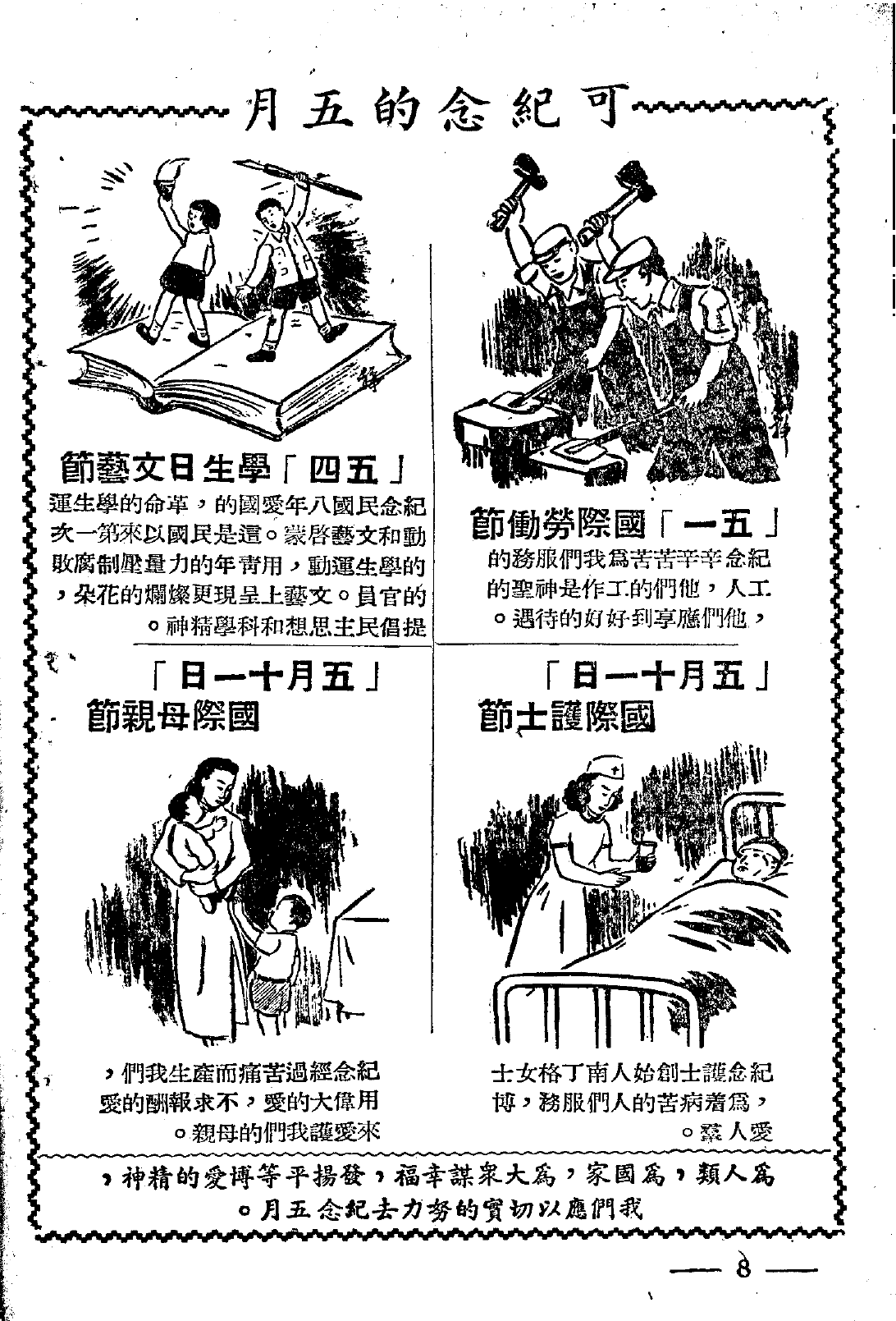 中文（中国大陆）: 可纪念的五月